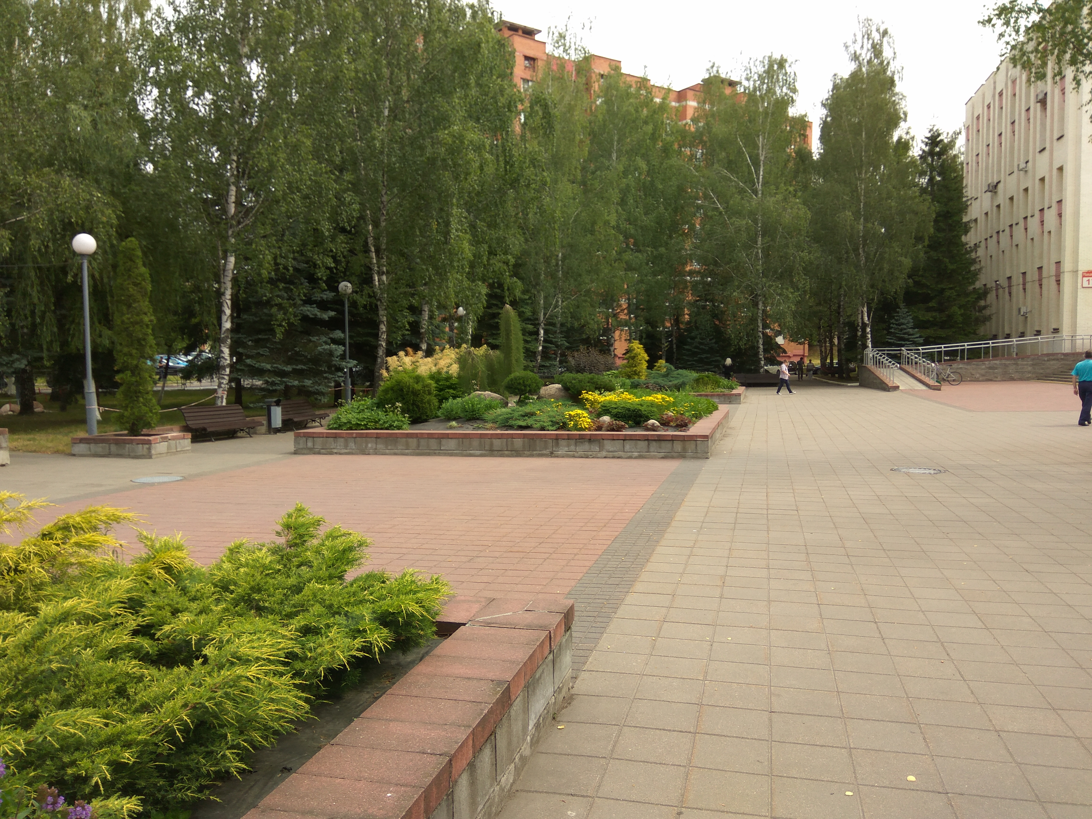 Мінск. Вуліца Макаёнка. Рэспубліканскі цэнтр медыцынскай рэабілітацыі і бальнеалячэння